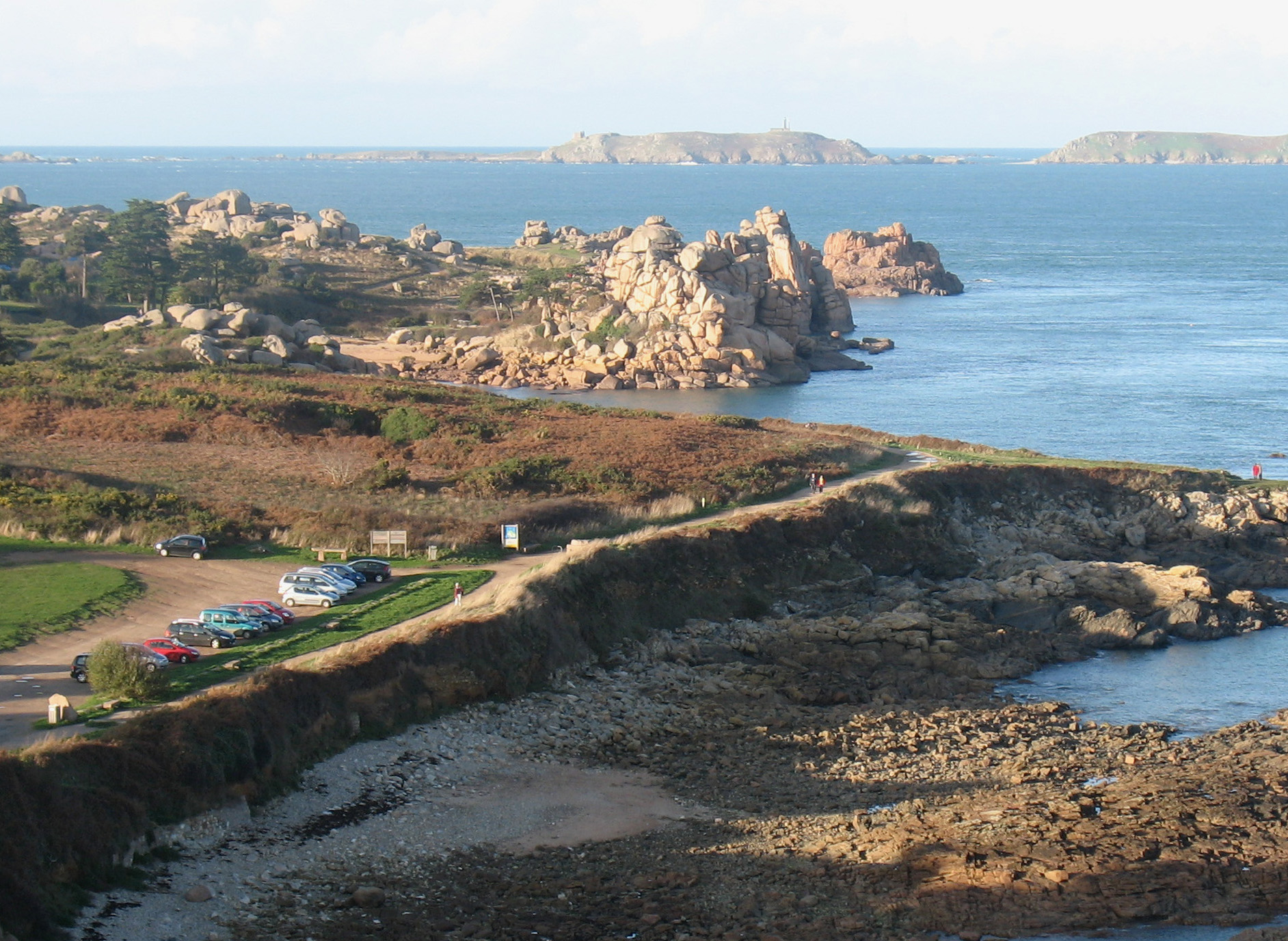 Sentier des douaniers à Perros-Guirec, Bretagne, France